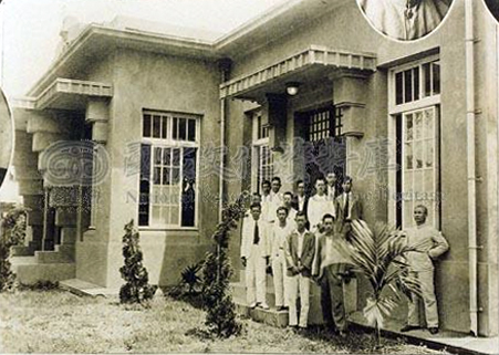 中文（台灣）: 烏日庄役場原貌